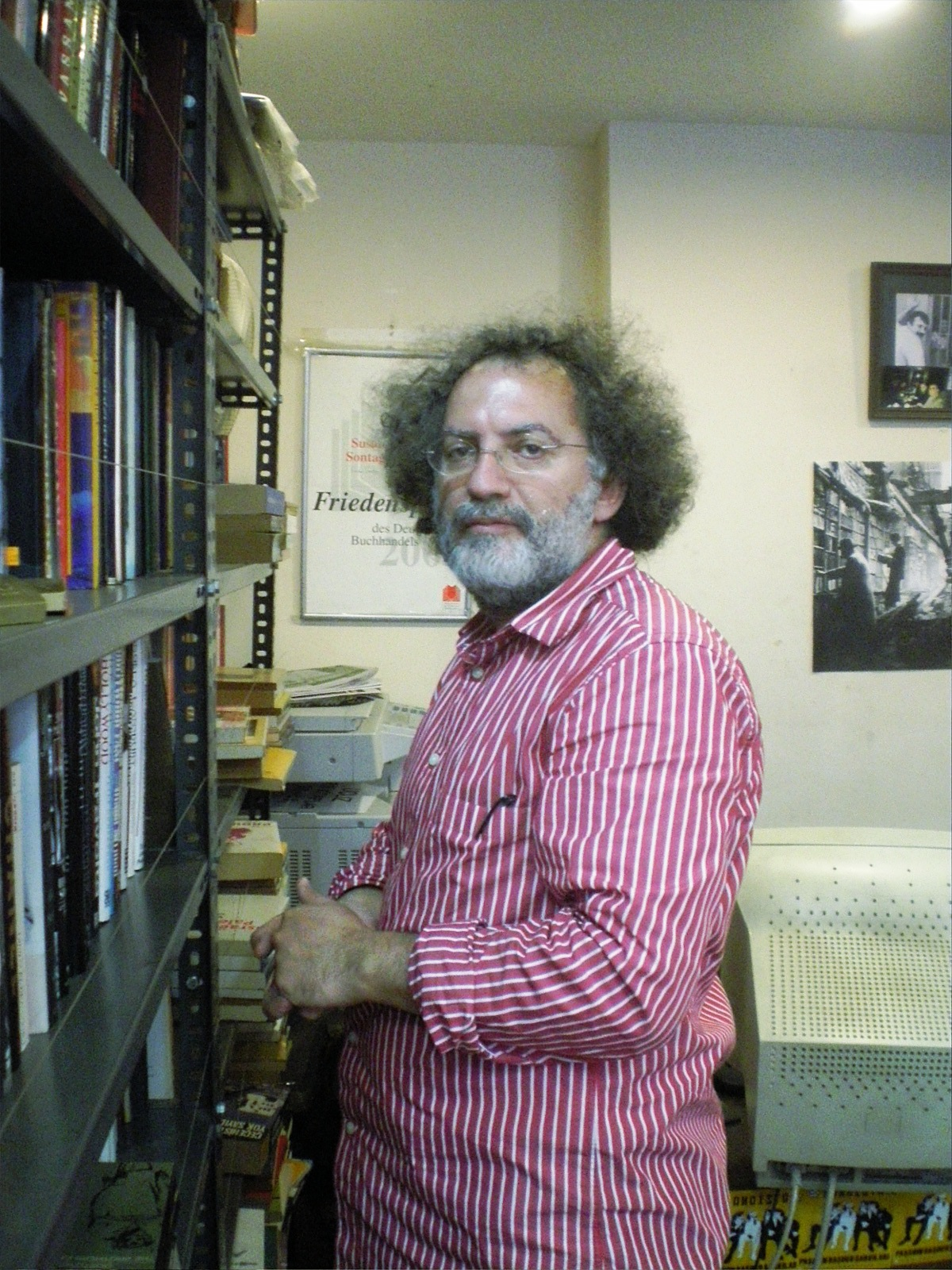 Osman Akınhay sahibi olduğu İstanbul Cukurcuma'daki Mesele Kitapçısı'nda